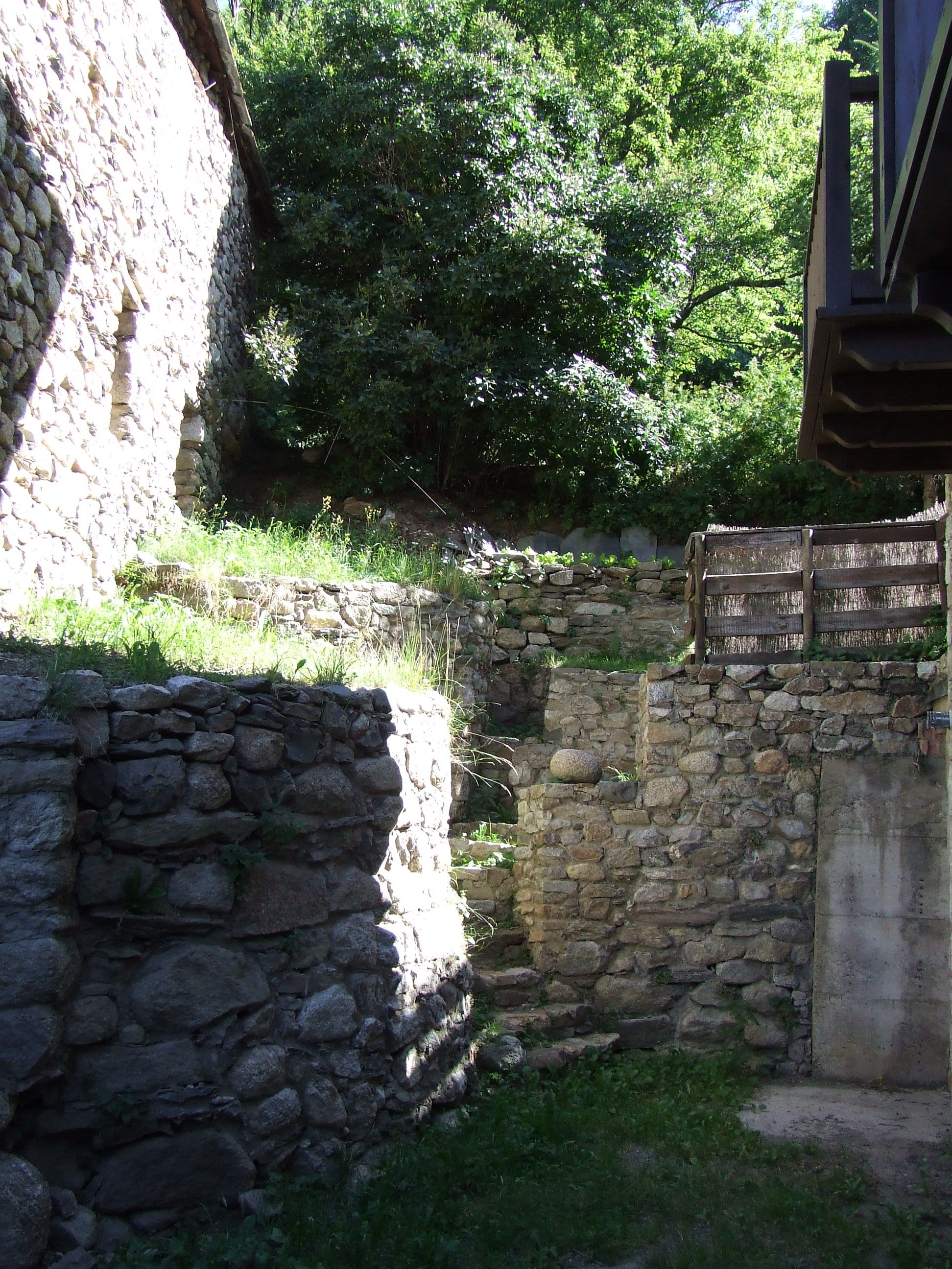 Restes de Sant Martí de Taüll (Vall de Boí, Alta Ribagorça)